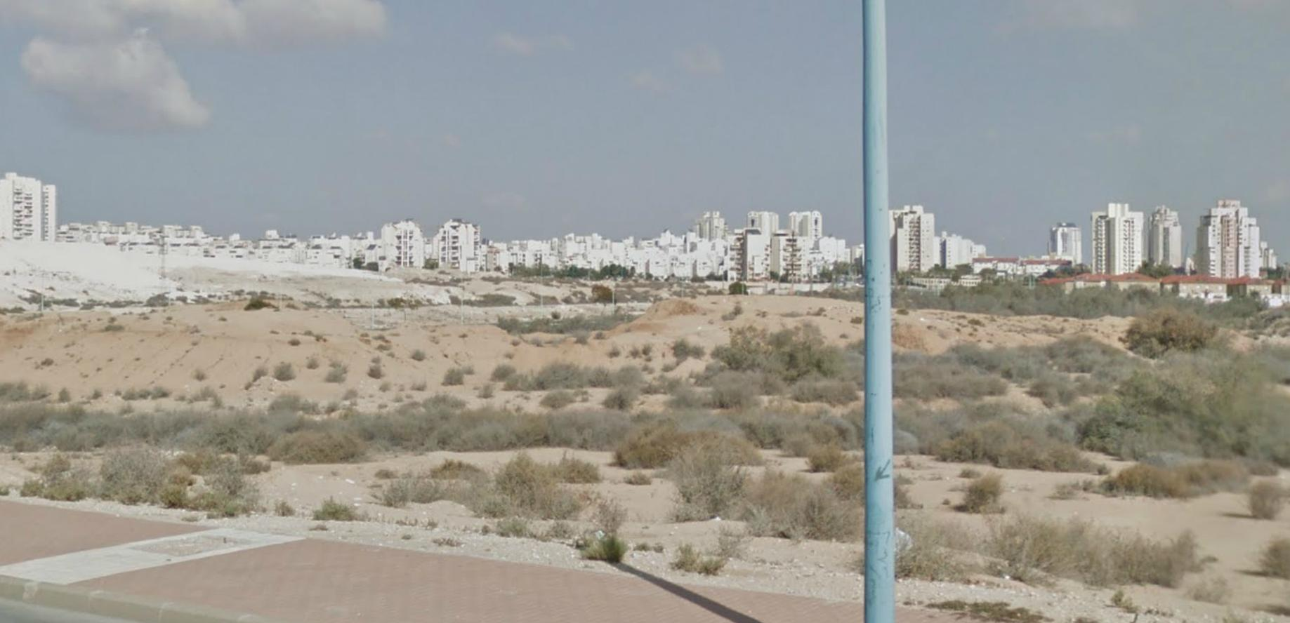 חורבת צפדי, אחד מהאתרים הארכאולוגיים של תרבות באר שבע